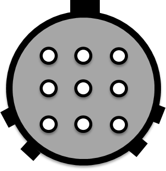 InCab Steckdose mit geschlossenem BUS. Kann vom angeschlossenen Gerät mittels Pin 1 umgeschaltet werden auf ofenen ISOBUS. Benötigt keinen Loop-Stecker